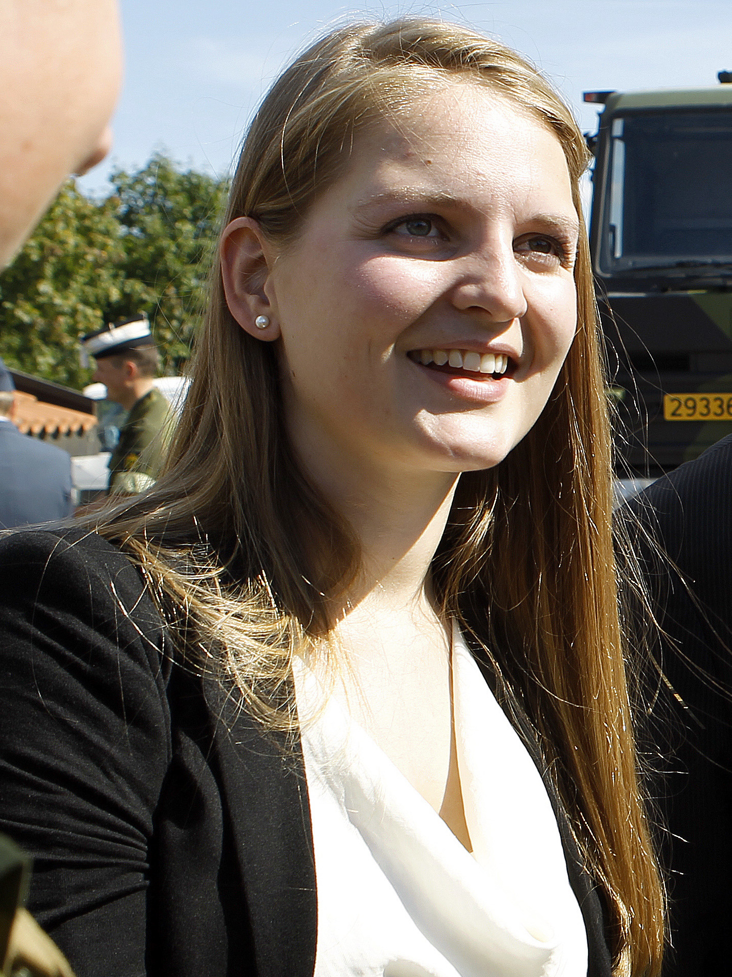 Ingrid Aune, 2012. Foto: Torbjørn Kjosvold, Forsvaret